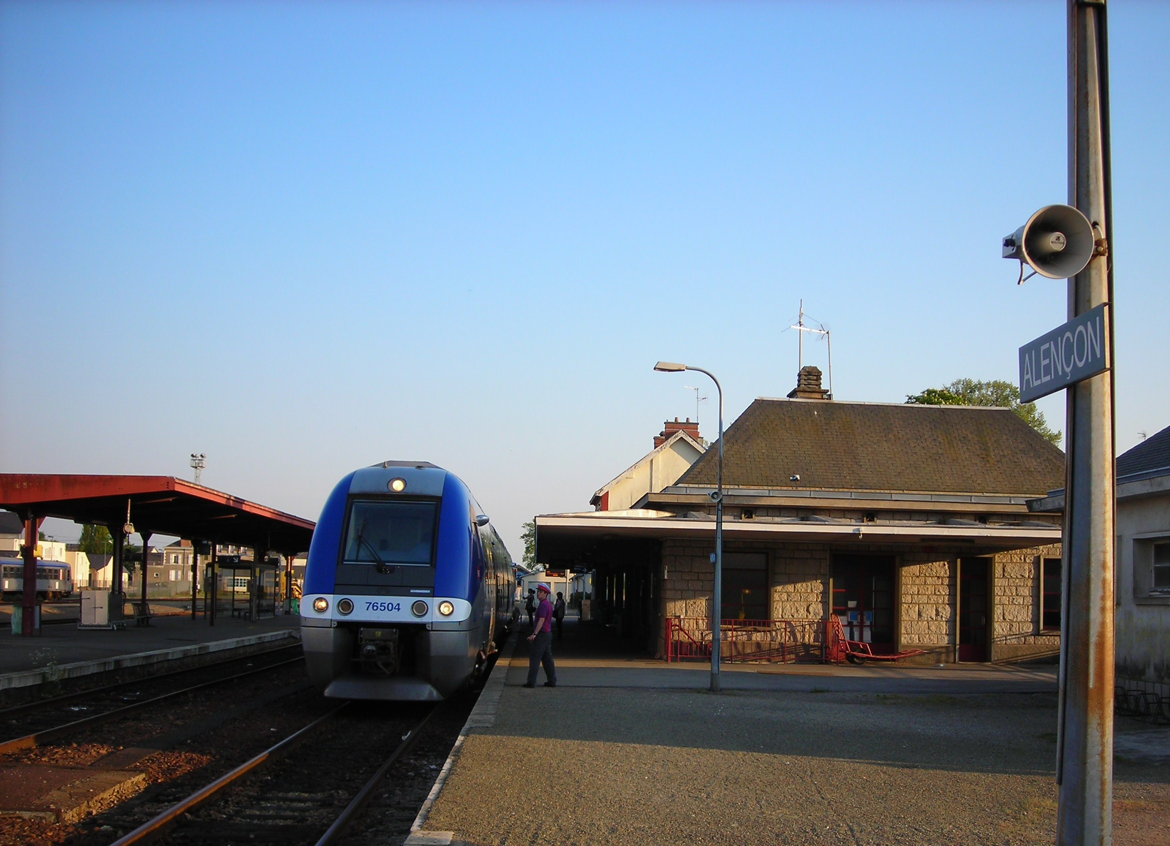 Train Ter Basse Normandie X 76500 en Gare d'Alençon (France, Normandie)